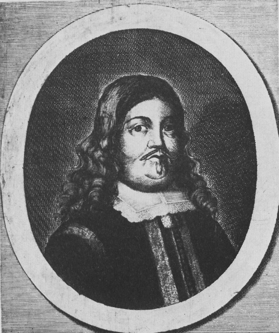 Graf Johann Berrnhard zur Lippe